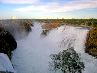 Cachoiera na cidade baiana de Paulo Afonso